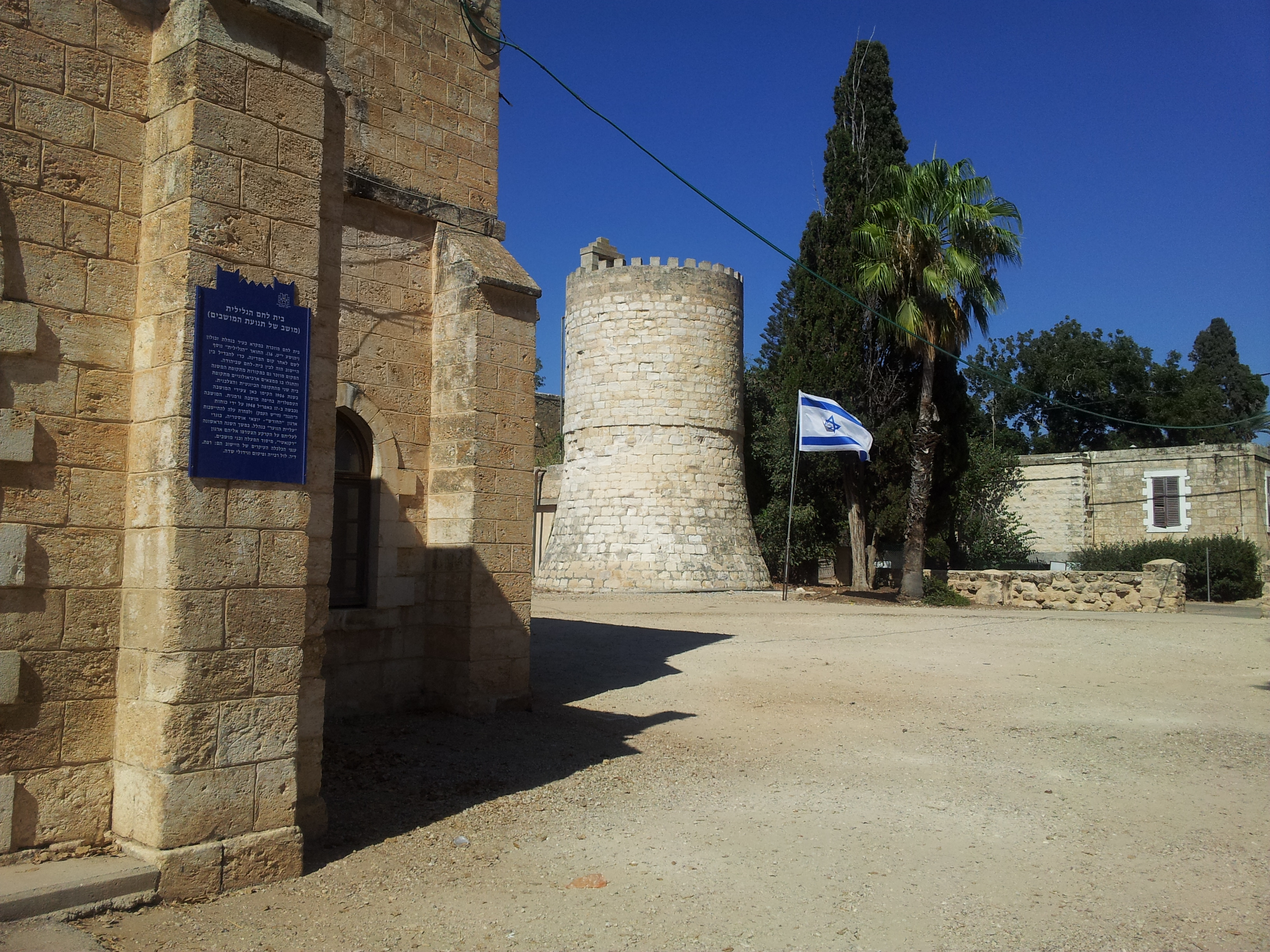 המתחם הטמפלרי בבית לחם הגלילית